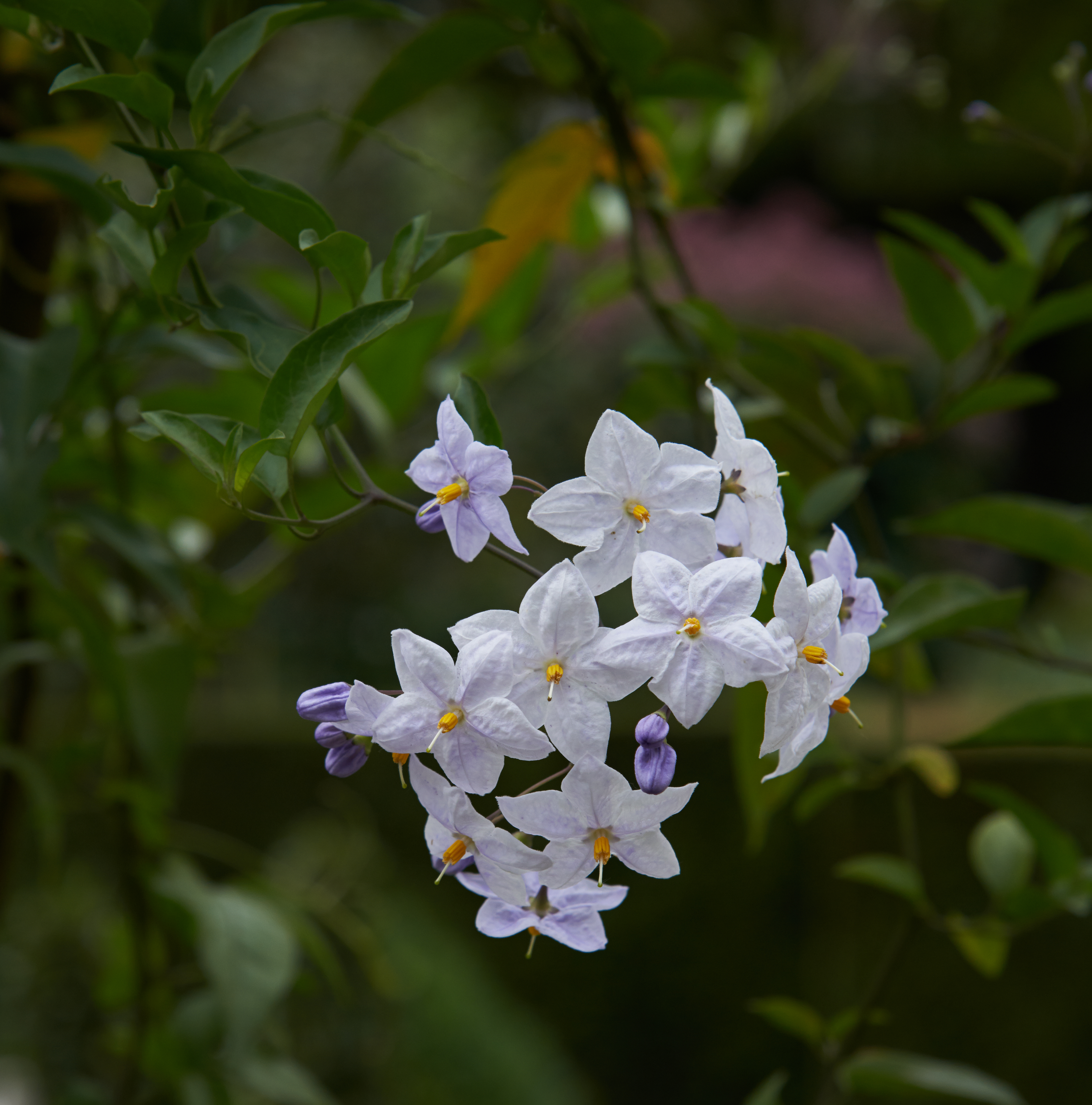 Solanum laxum in de Kruidtuin te Leuven, België